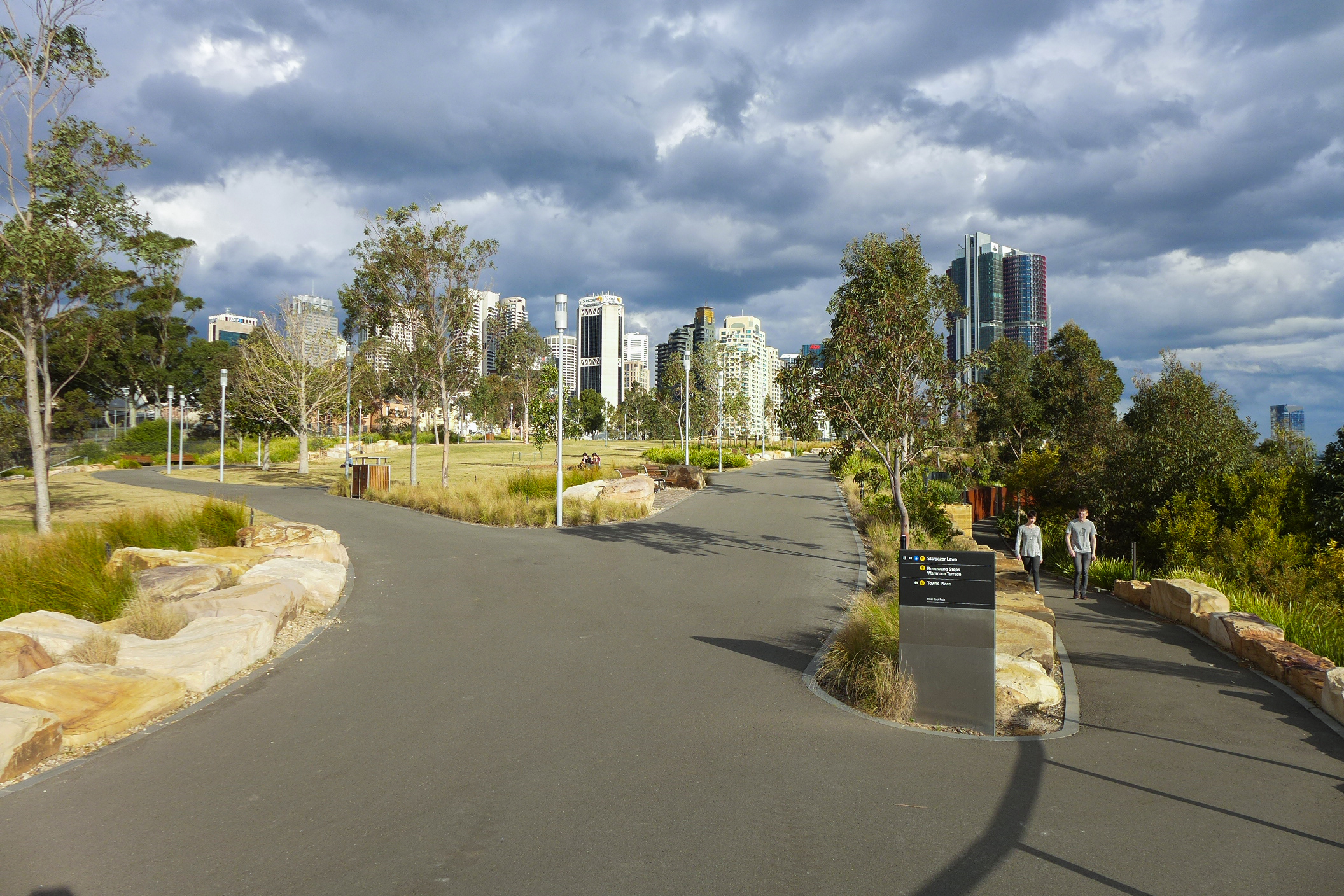 Barangaroo Reserve